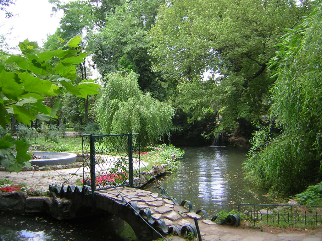 Cismigiu Garden in Summer